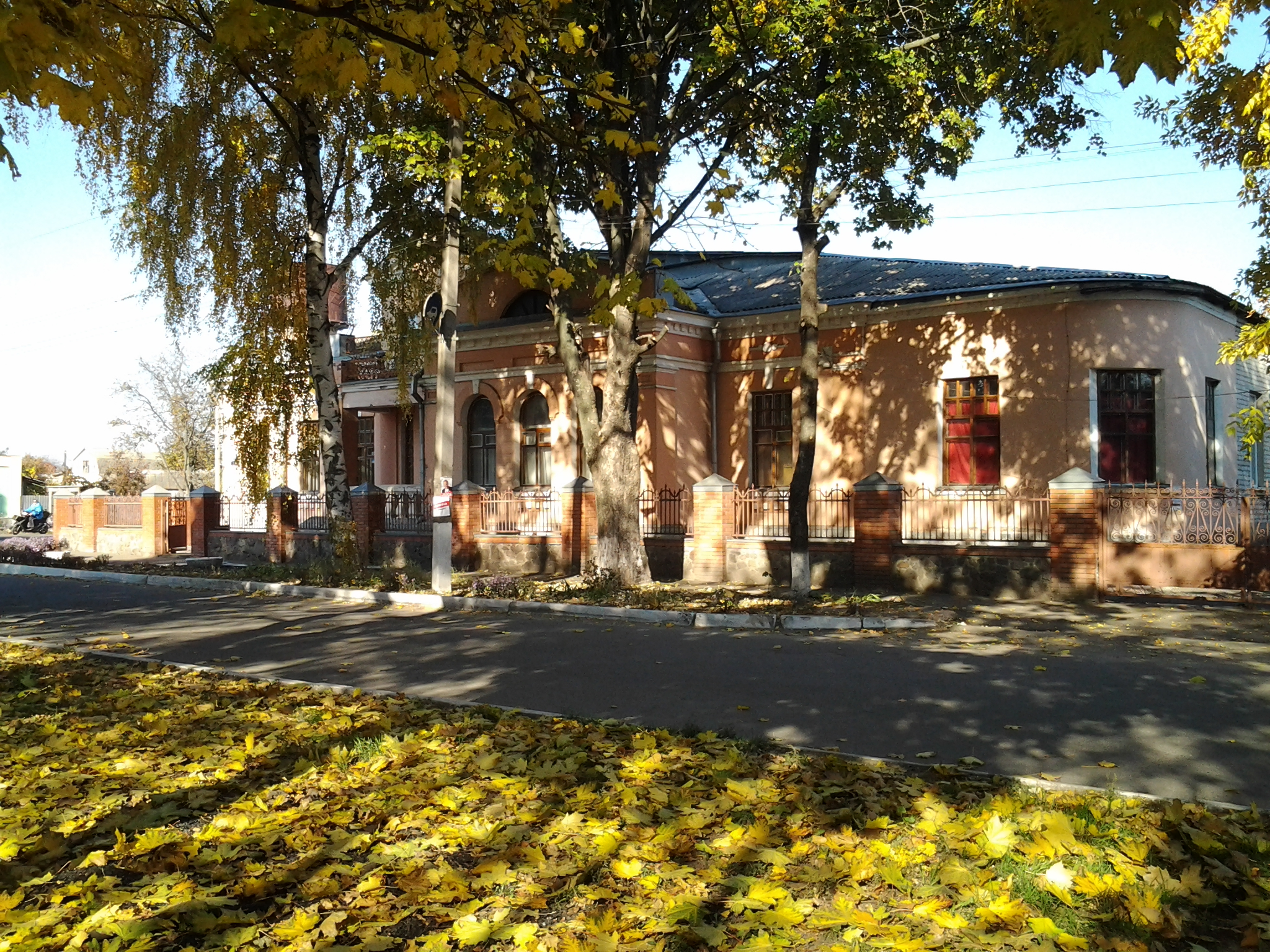 Особняк Шиндлера Р.Ф. (сучасне використання — краєзнавчий музей), Красноград, вулиця Жовтнева, 55